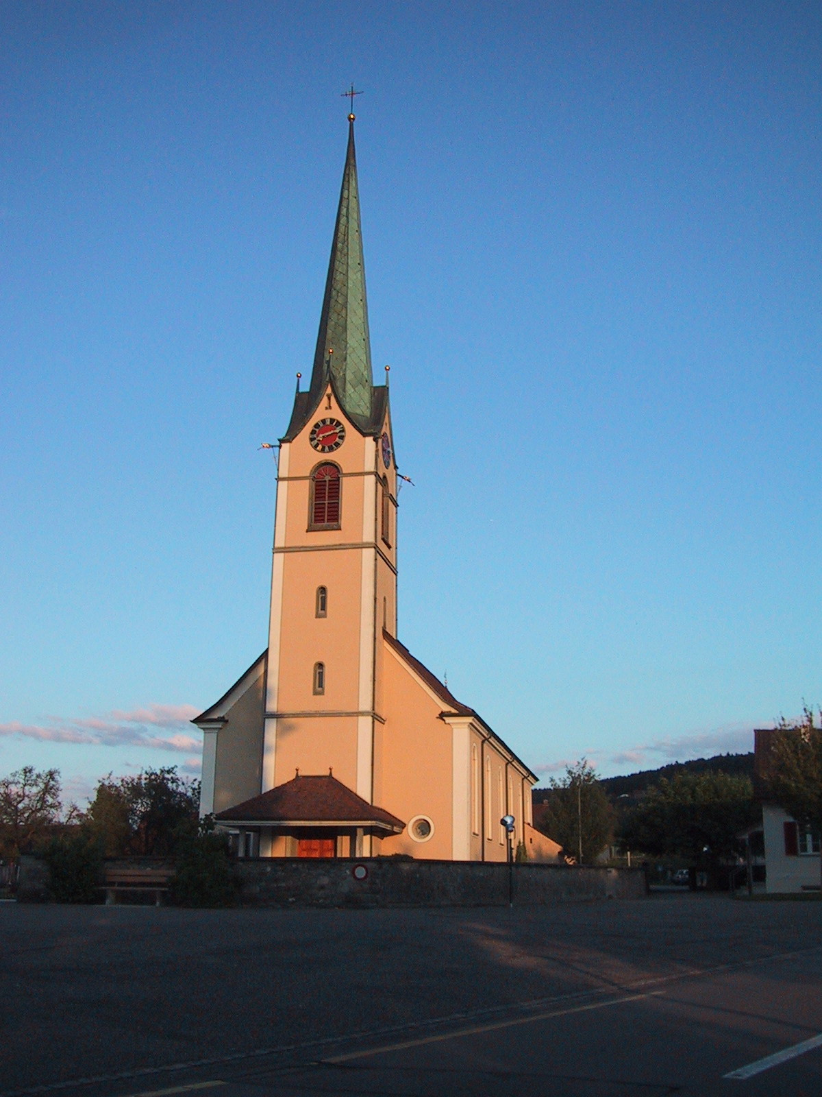 Kirche in Eschenz, Kanton Thurgau